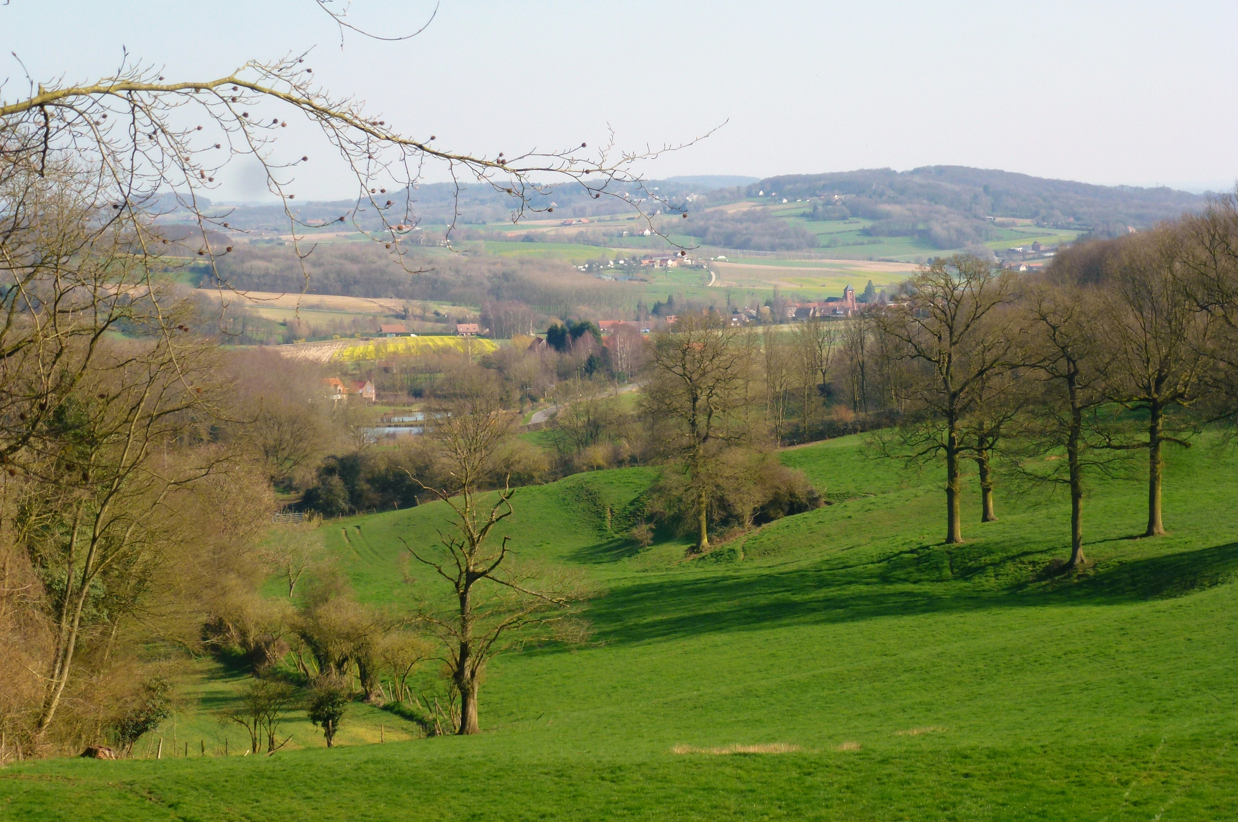 Autour du Mont des Cats , Berthensur le GR128.- Flandre française, Nord-Pas-de-Calais-Picardie France.